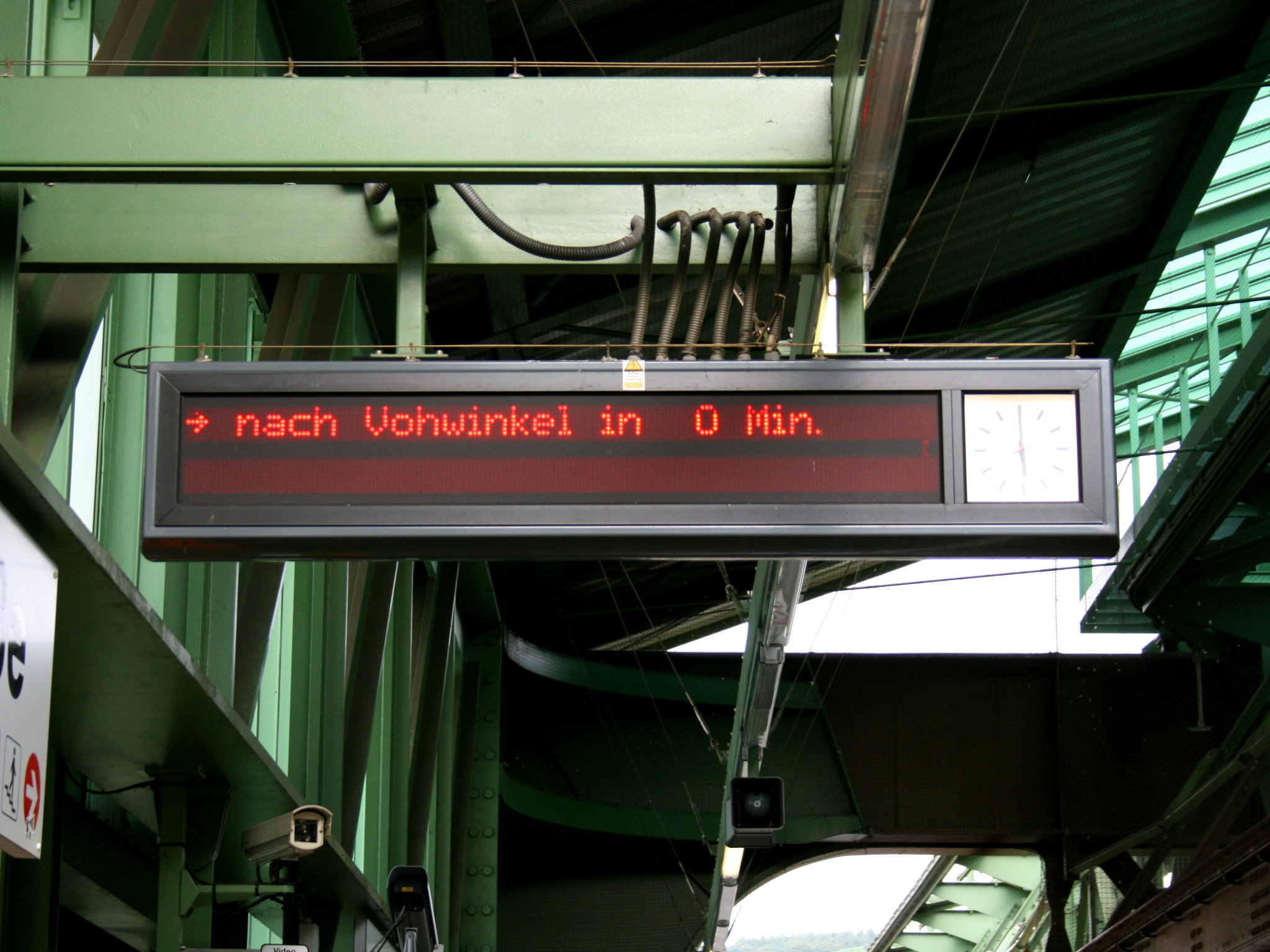 Schwebebahnstation Sonnborner Straße